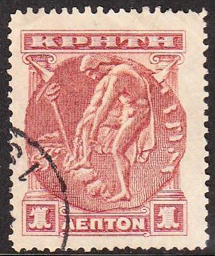 Первая почтовая марка Критского государства